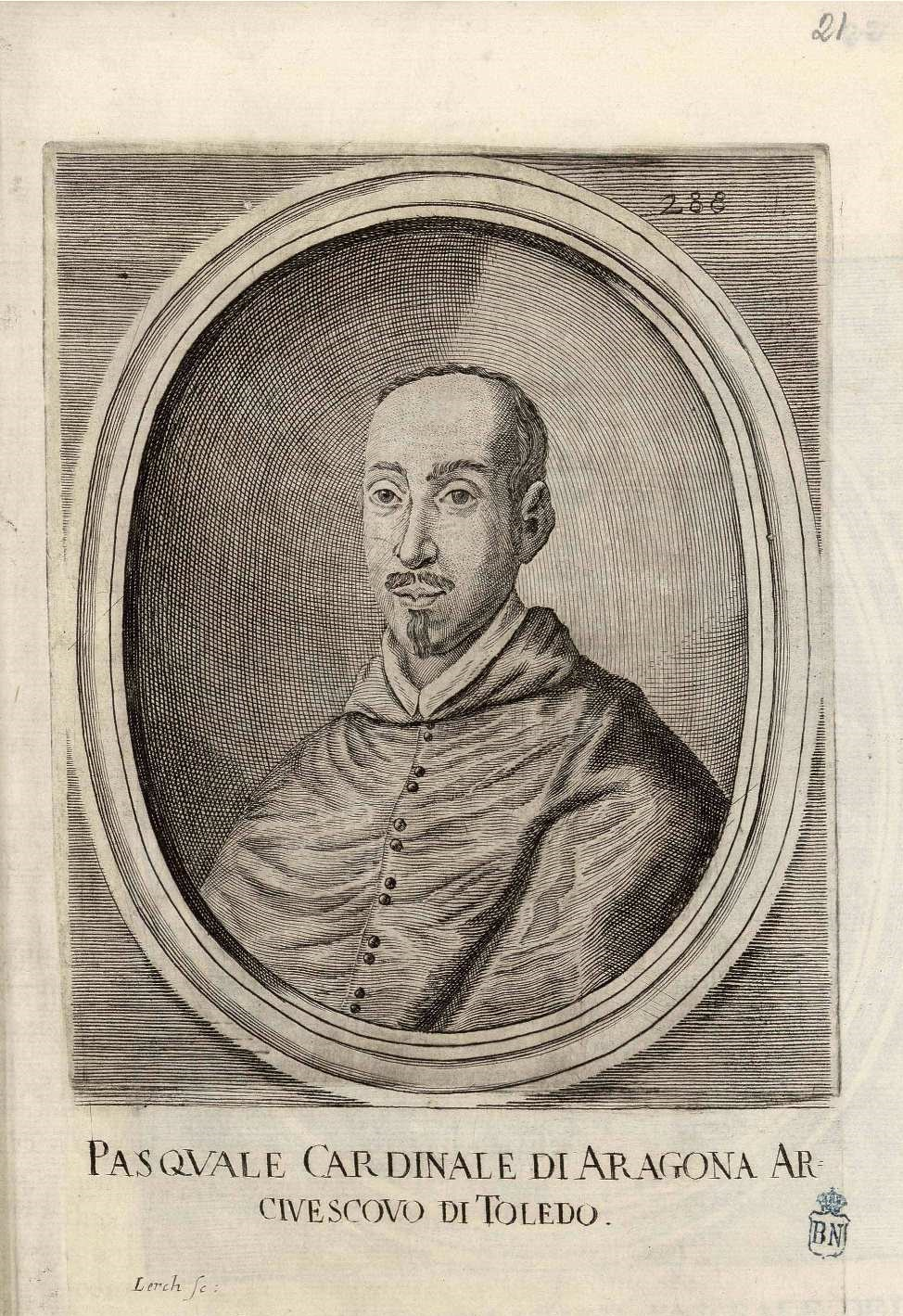 Pascual de Aragón, arzobispo de Toledo, grabado firmado I. M. Lerch publicado con la "historia di leopoldo cesare Continente le cose piú memorabili successe in Europa dal 1656 al 1670" del conde Galeazzo Gualdo Priorato, Viena, 1670